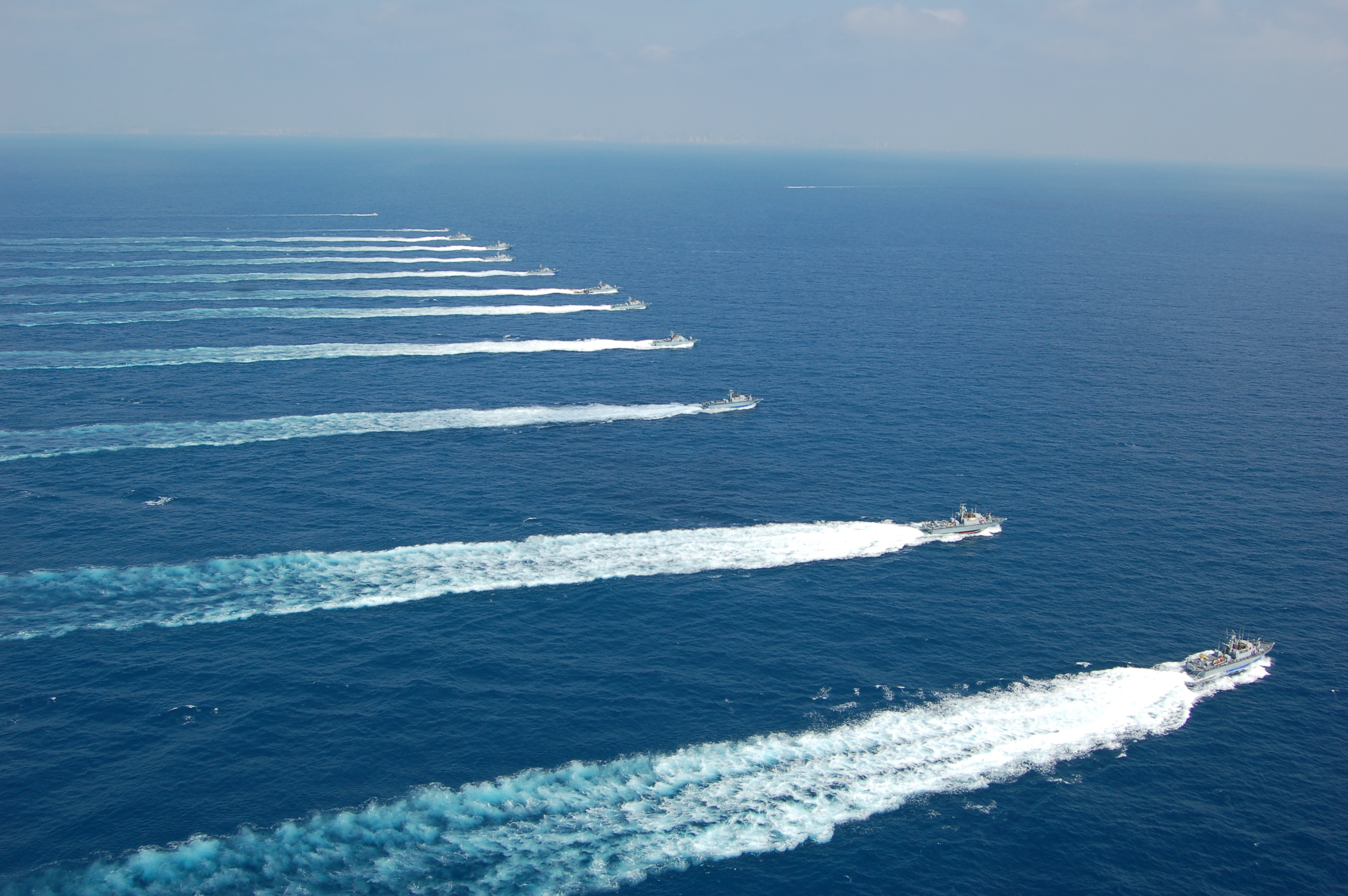 אימון כלי בט"ש מדגמי דבורה ושלדג